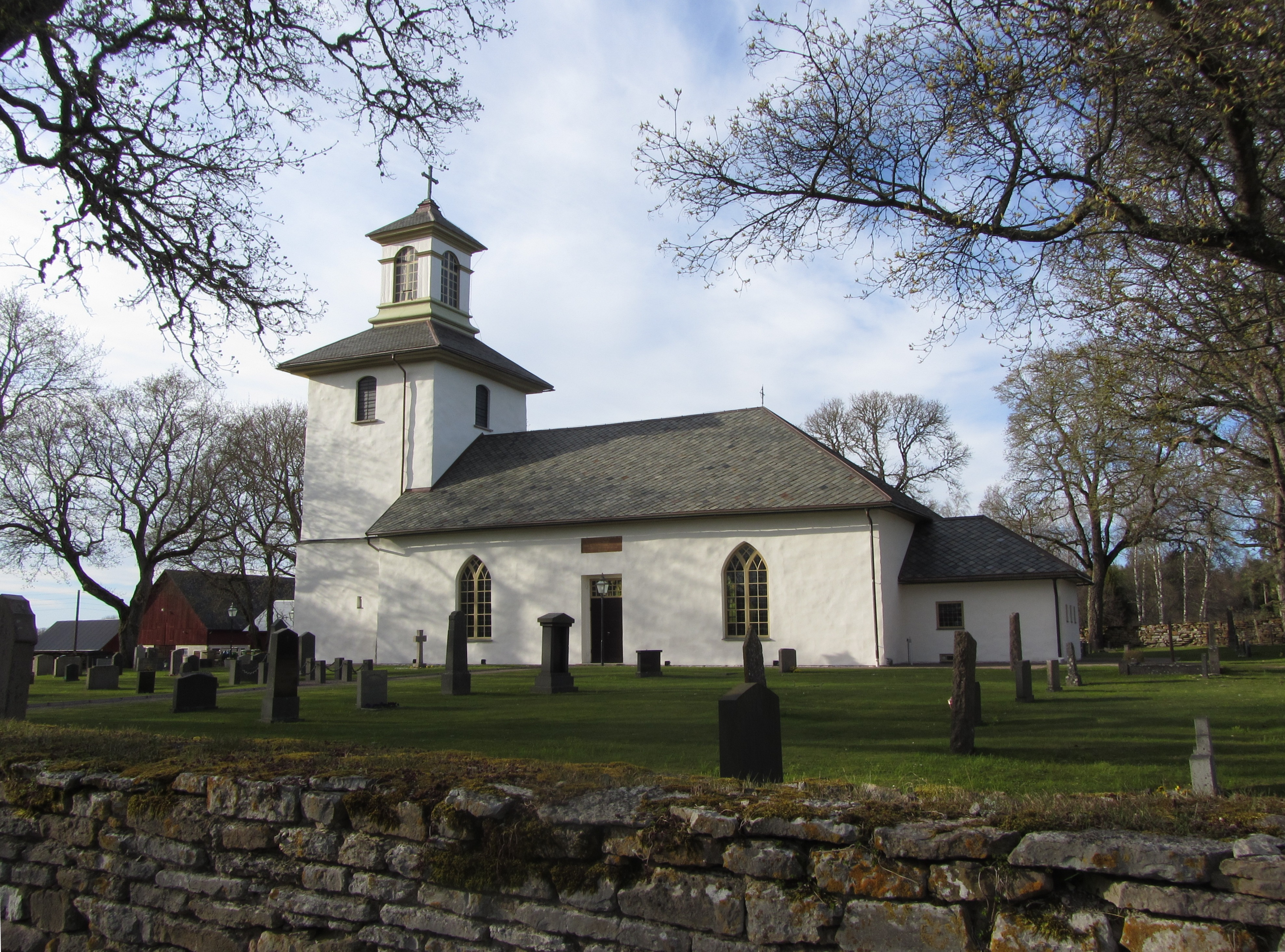 Horns kyrka i södra Vadsbo härad norr om Skövde i Västergötland.